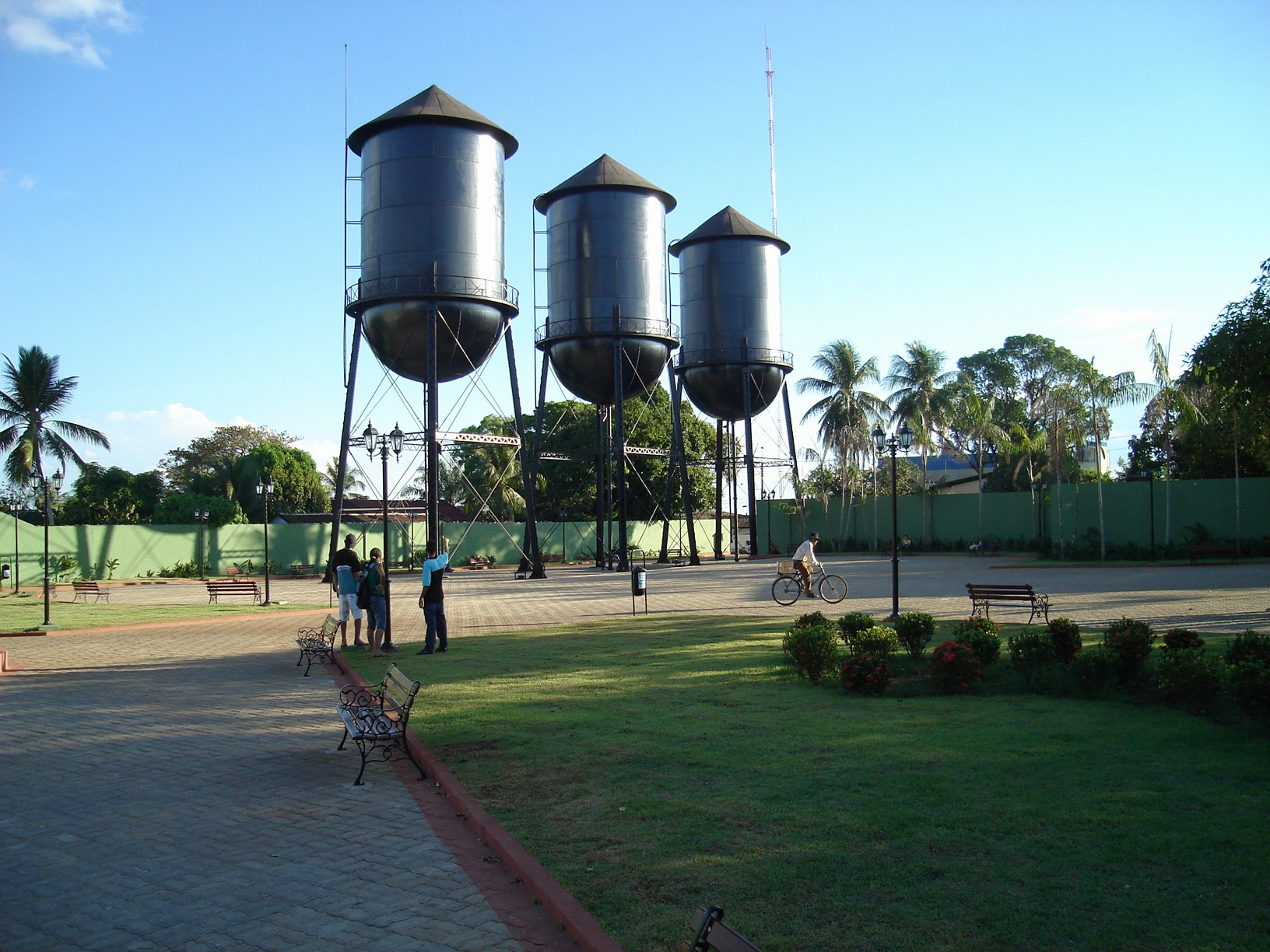 Praça das Três Marias, Porto Velho, Rondônia, Brasil - Three "Maries" Square, Porto Velho, Rondônia, Brazil.